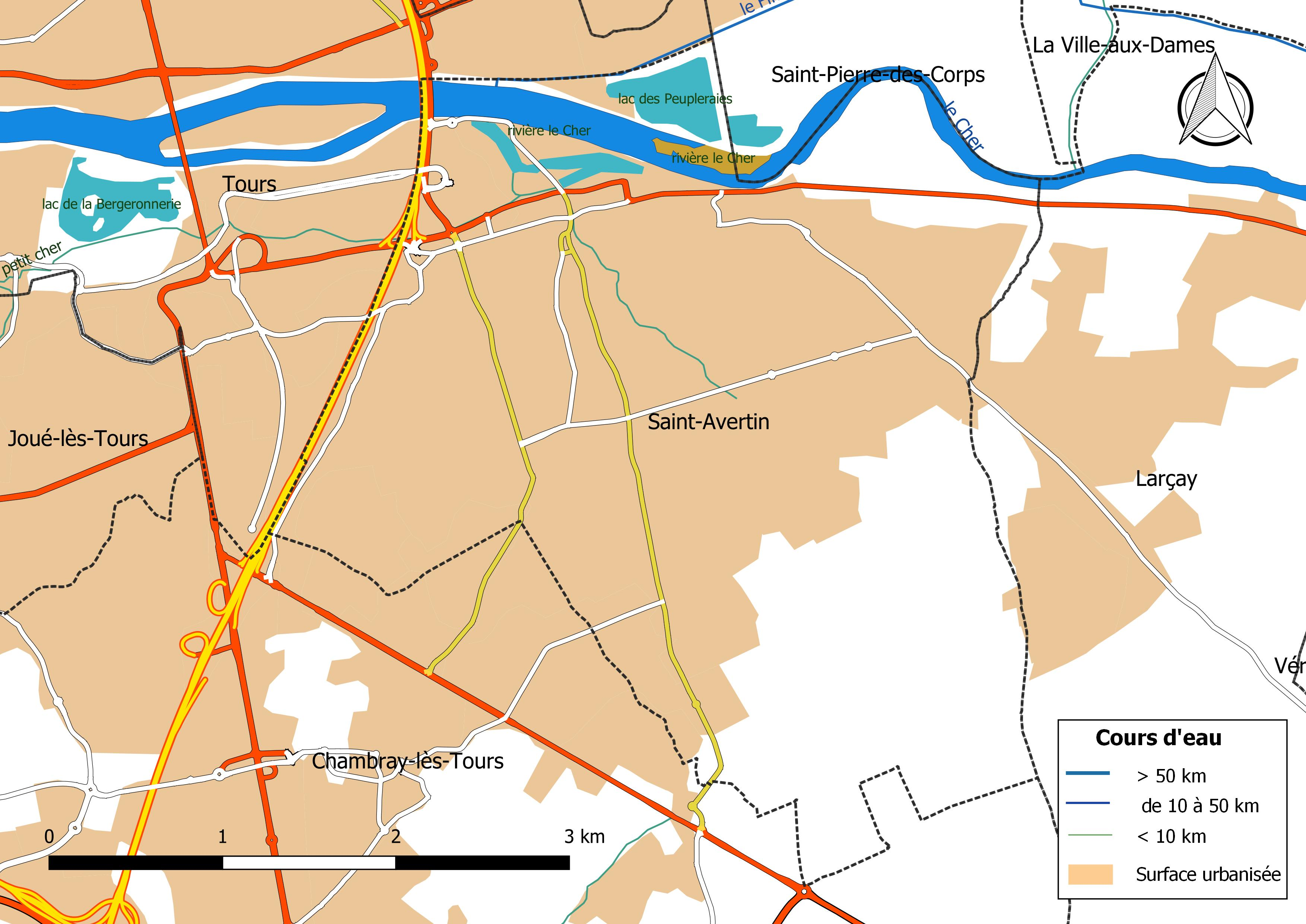 Carte du réseau hydrographique de la commune de Saint-Avertin (France).